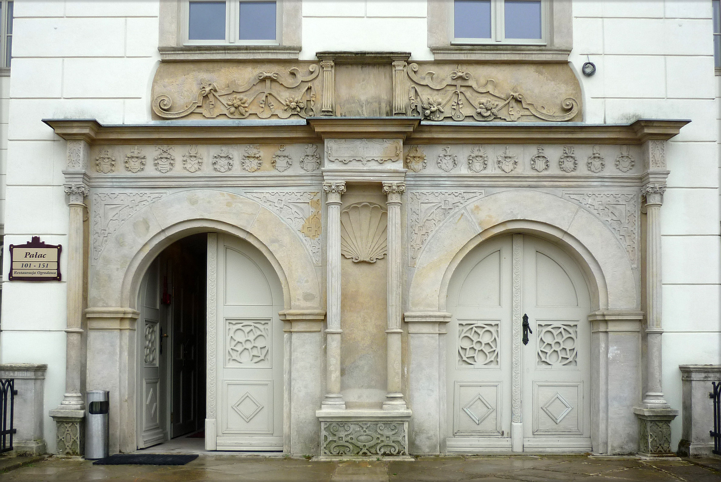 Portal von Schloss Schildau (Wojanów) im Hirschberger Tal in NIederschlesien